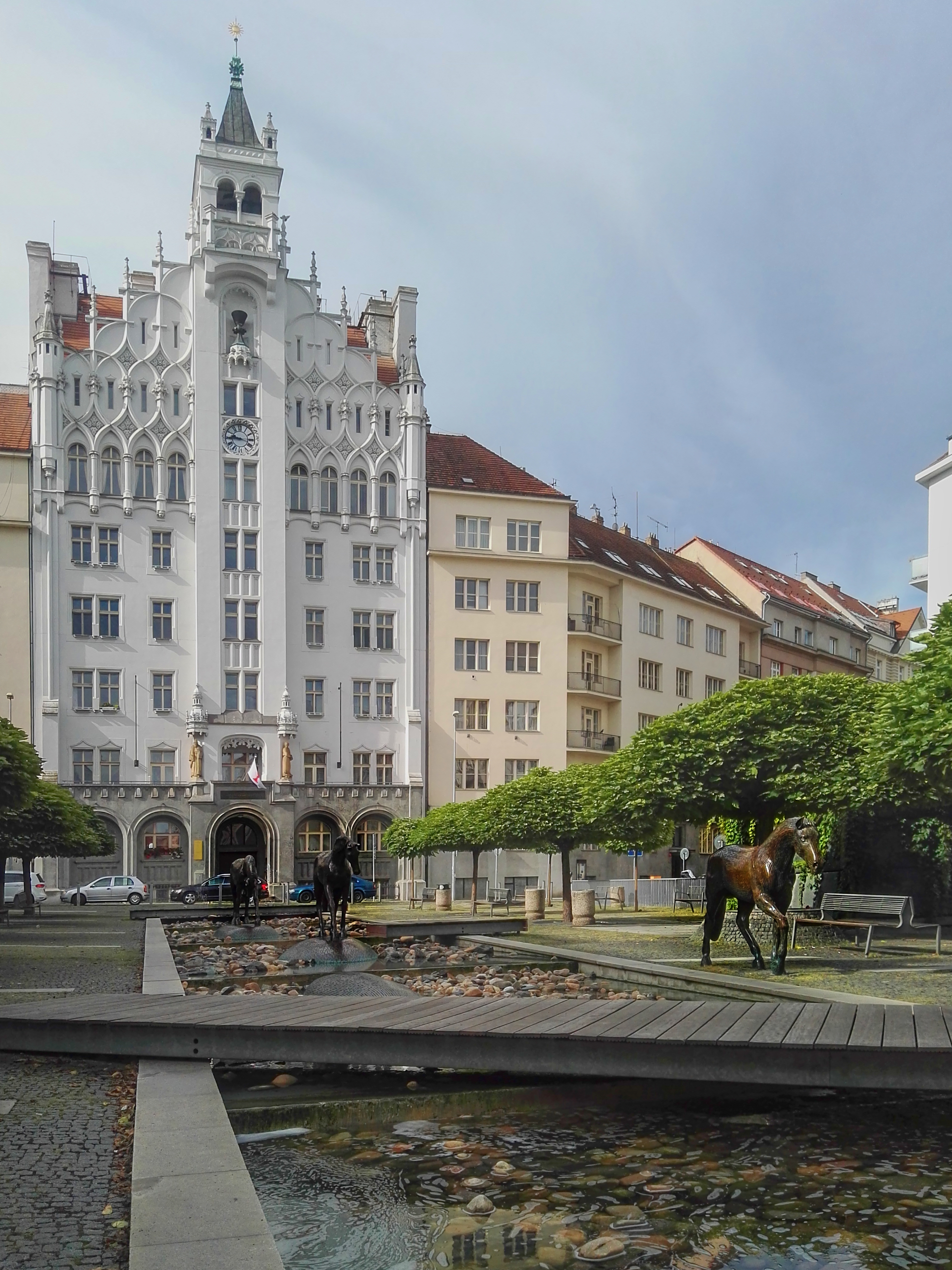 Praha, Šabachův park v Dejvicích s budovou Husova sboru